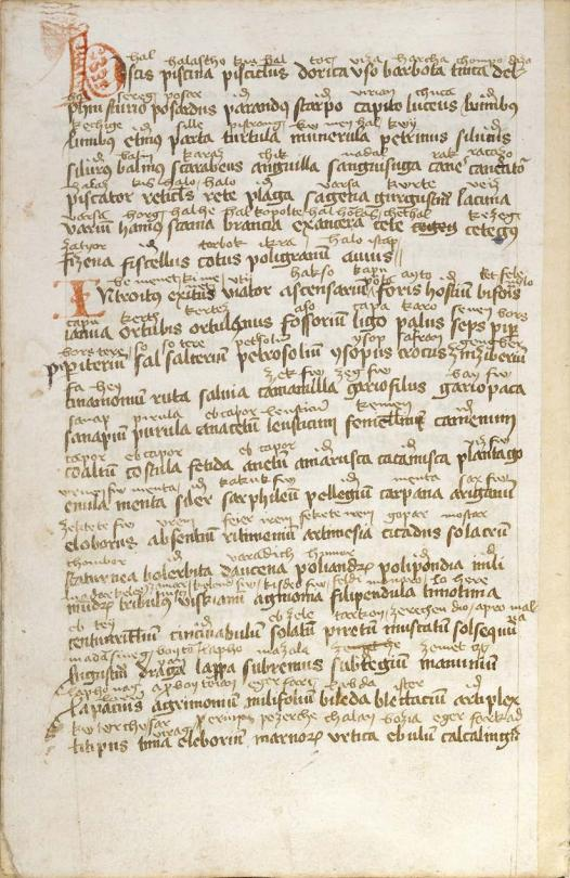 Schlägli szójegyzék egy lapja, magyar nyelvemlék